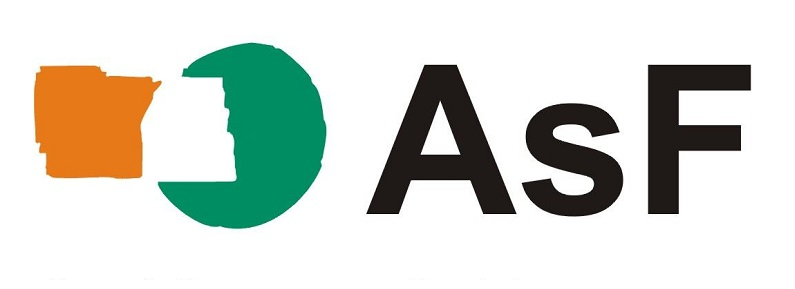 Arxivers sense Fronteres